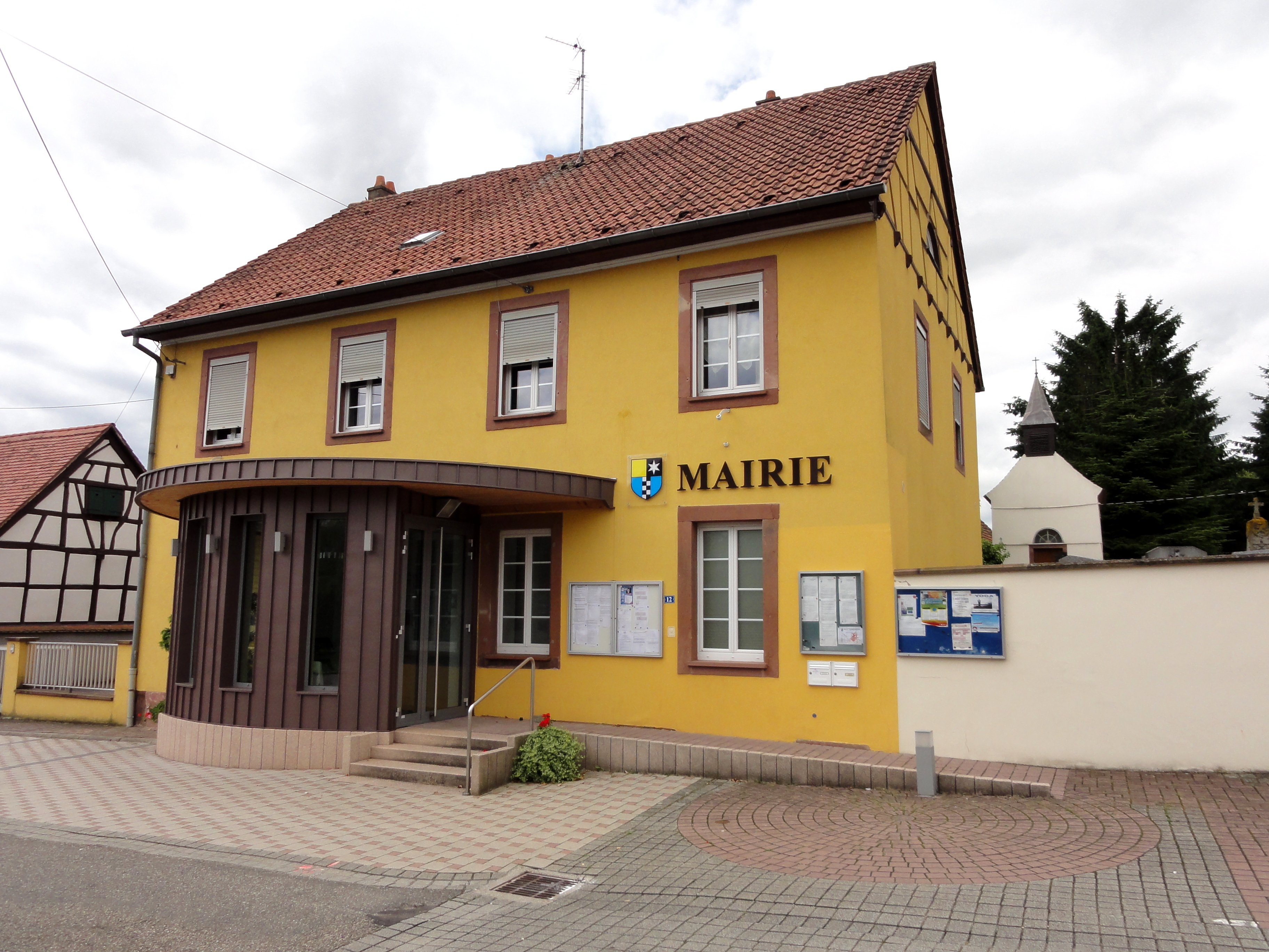 Alsace, Bas-Rhin, Wittersheim, Mairie-école (XIXe), rue de l'église.